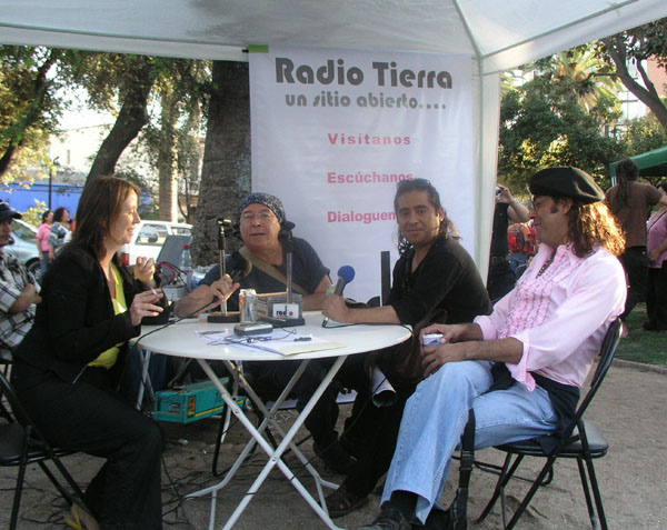 Triángulo abierto junto a Pedro Lemebel